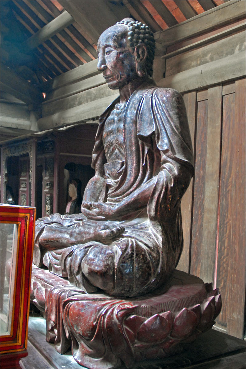 Le Bouddha jeûnant ou Bouddha ascète dans la salle du culte. La pagode But Thap (Ninh-Phuc) s'élève dans le village de Dinh To, à 30 Km au sud-est de Hanoi. Elle a été érigée en 1646-1647 par le moine chinois Minh Hanh. Elle compte plusieurs bâtiments dont quatre sont entourés d'un mur d'enceinte. Les bâtiments sont reliés par des galeries.